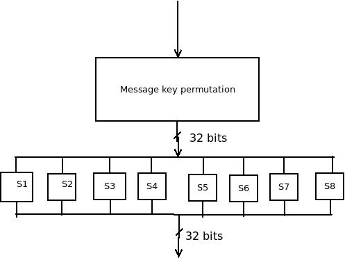 Блок-схема PALS 2